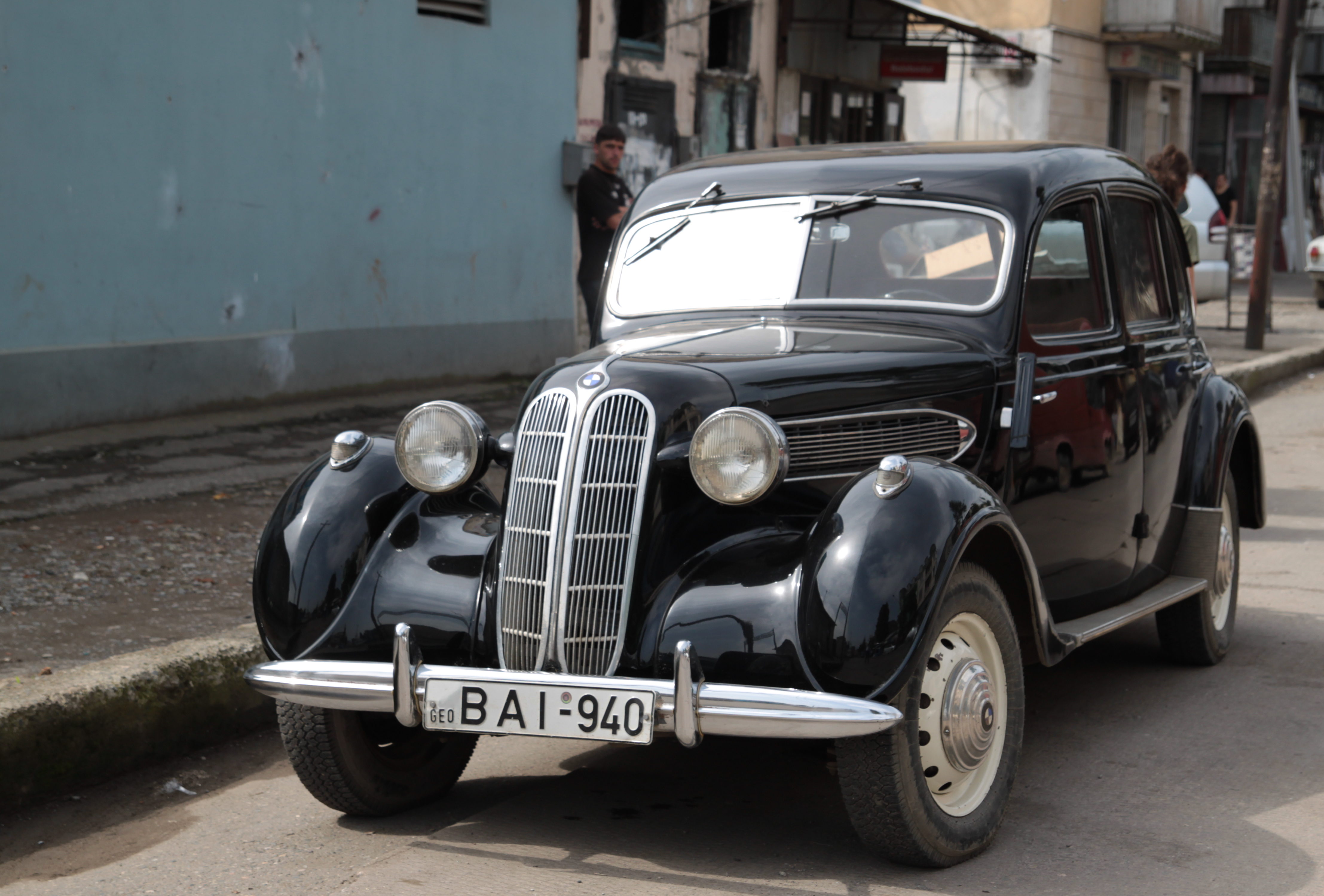 BMW 326 in Batumi